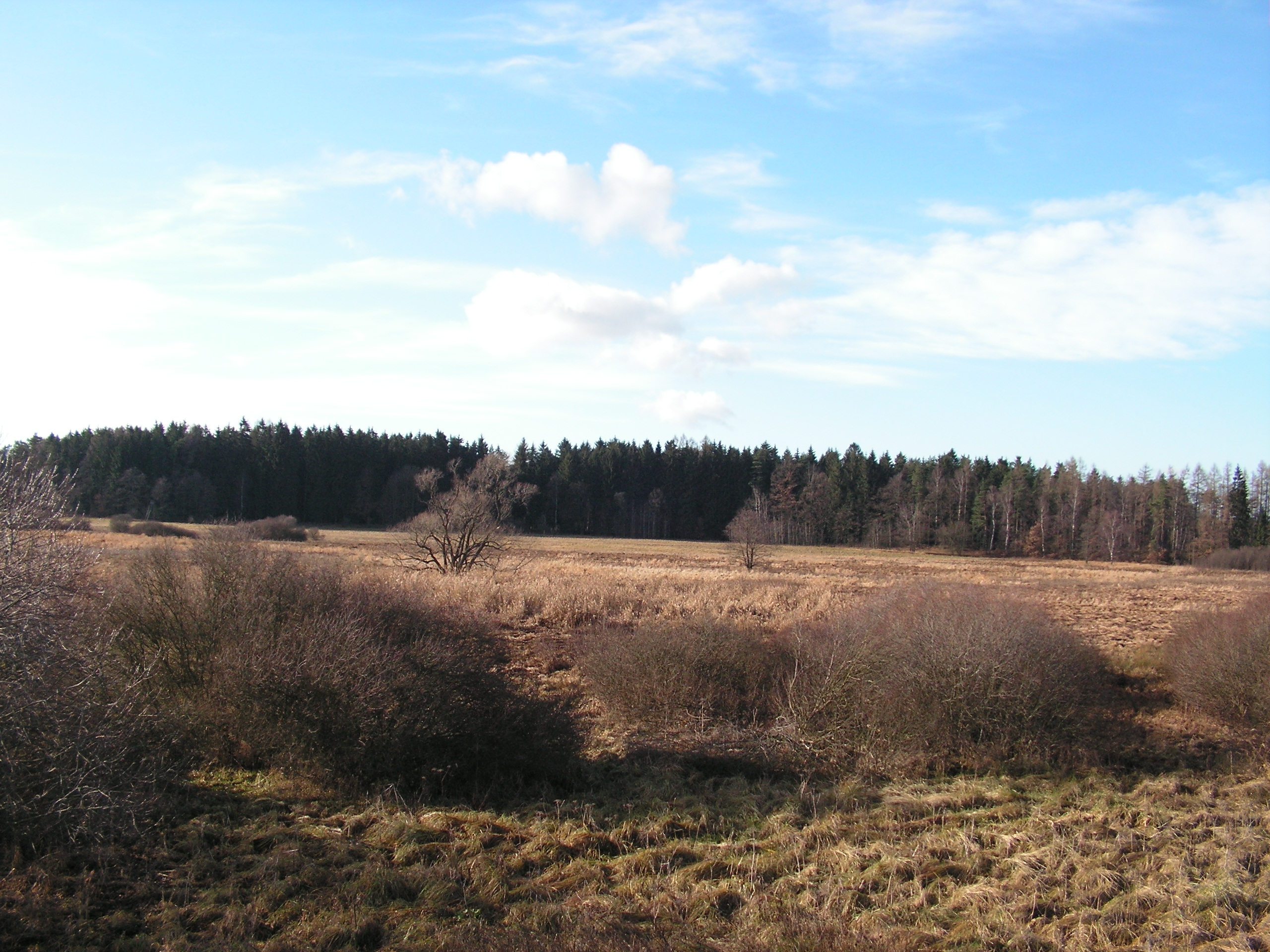 Pohled na PR Havranka, která se nachází jihovýchodně od Habrů v mělkém údolí při soutoku Jiříkovského a Vepříkovského potoka v okrese Havlíčkův Brod.